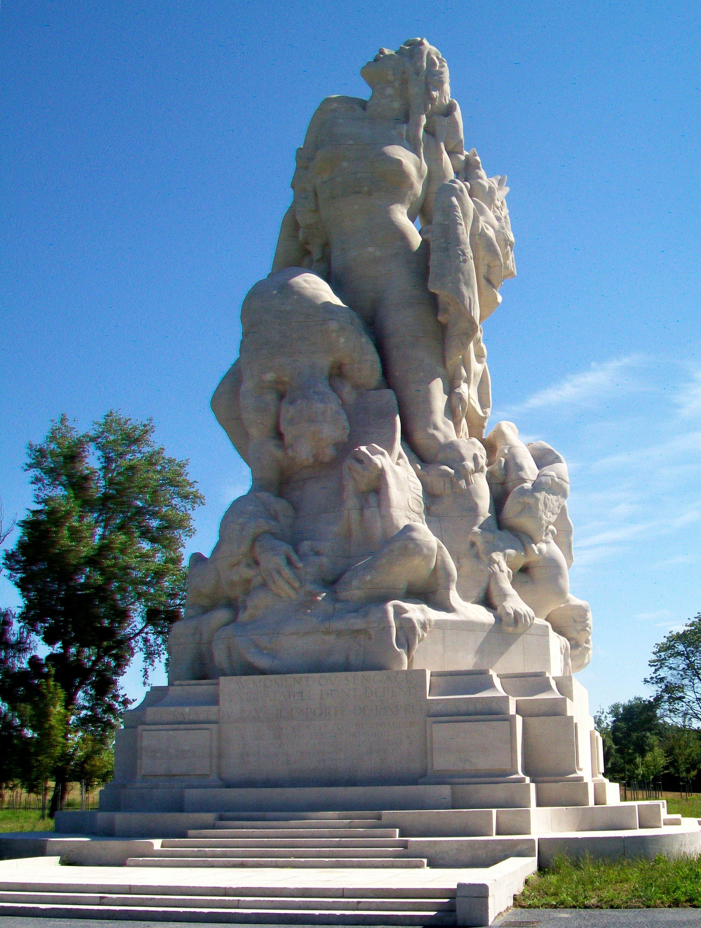 "La Liberté éplorée" ou "Monument américain", par Frederick MacMonnies, inauguré le 11 sept. 1932. Situé immédiatement au nord du Musée de la Grande Guerre du pays de Meaux. Inscription ouest: "Au moment où s'engage une bataille dont dépend le Salut du pays, il importe de rappeler à tous que le moment n'est plus de regarder en arrière. Tous les efforts doivent être employés à attaquer et refouler l'ennemi. Une troupe qui ne peut plus avancer devra coûte que coûte garder le terrain conquis et se faire tuer sur place plutôt que de reculer."